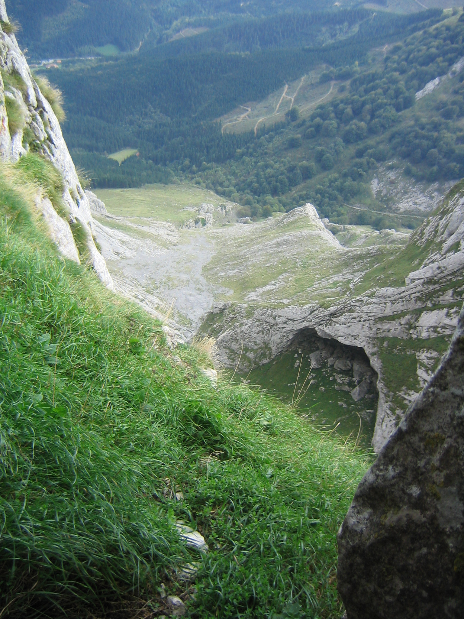 Anboto, Artaungo sakona desde la cueva de Mari. Sierra del Anboto (Duranguesado)Vizcaya, País Vaco, España.